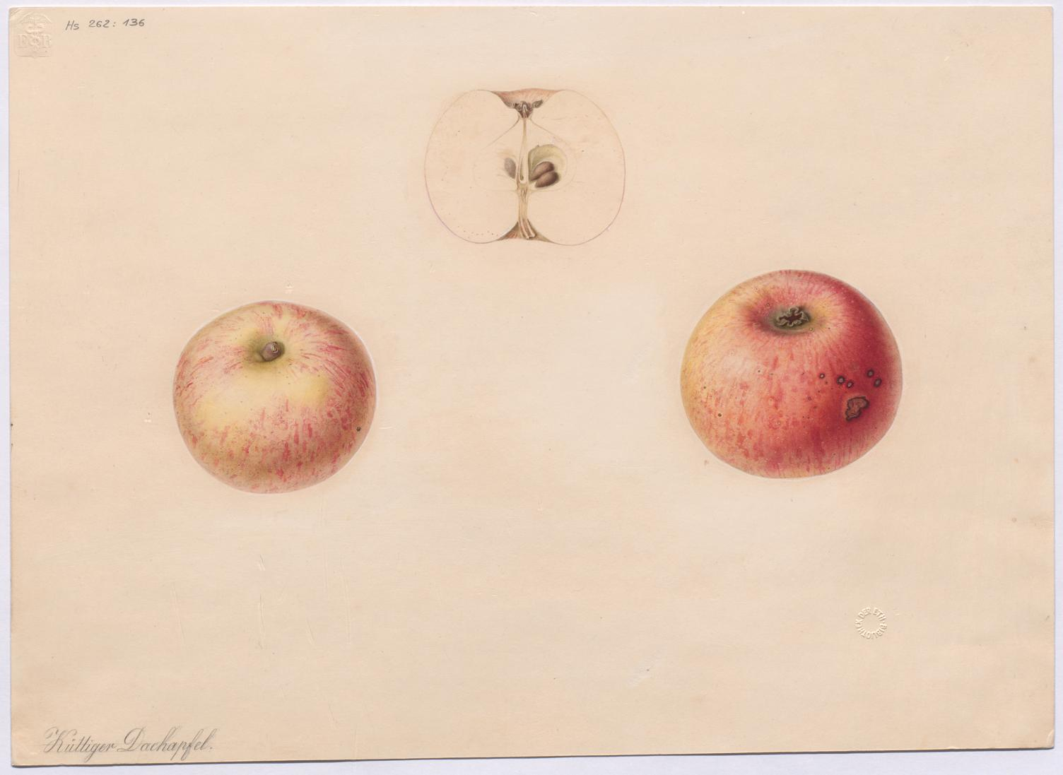 Apfelsorte Küttiger Dachapfel: Originalbild von zwei Seitenansichten und Längsschnitt. Wissenschaftliche obstkundliche Zeichnung, naturgetreu dargestellt von Salomon Bühlmeier, im Auftrag der schweizerischen pomologischen Kommission des Schweizerisch-landwirtschaftlichen Vereins. Aquarell mit Darstellung von zwei Seitenansichten und Längsschnitt in natürlicher Grösse. Als Grundlage für die Bearbeitung für den lithographischen Farbendruck bei J. Tribelhorn in St. Gallen, im Hinblick auf die Publikation: Schweizerische Obstsorten, herausgegeben vom Schweizerisch-landwirtschaftlichen Verein, St. Gallen 1863-1872, ausgeliefert in 10 Heften, anschliessend gebunden in 2 Bänden (Bd. 1: Äpfel, Bd. 2: Birnen). Der Druck ab Vorlage(n) ist eingereiht in Bd. 1 (Äpfel), alphabetisch unter "Küttiger Dachapfel", mit anschliessendem Kommentar zu Namen und Synonymen, Abstammung und Verbreitung, Baumeigenschaften, Fruchtbeschreibung, Nutzung und Zubereitung. Die vorliegende Obstsorte wurde aufgrund ihrer Verbreitung in der Schweiz und aufgrund der Beurteilung als empfehlenswert zur Publikation ausgewählt und war Teil der achten Auslieferung (zwischen 1863 und 1872)